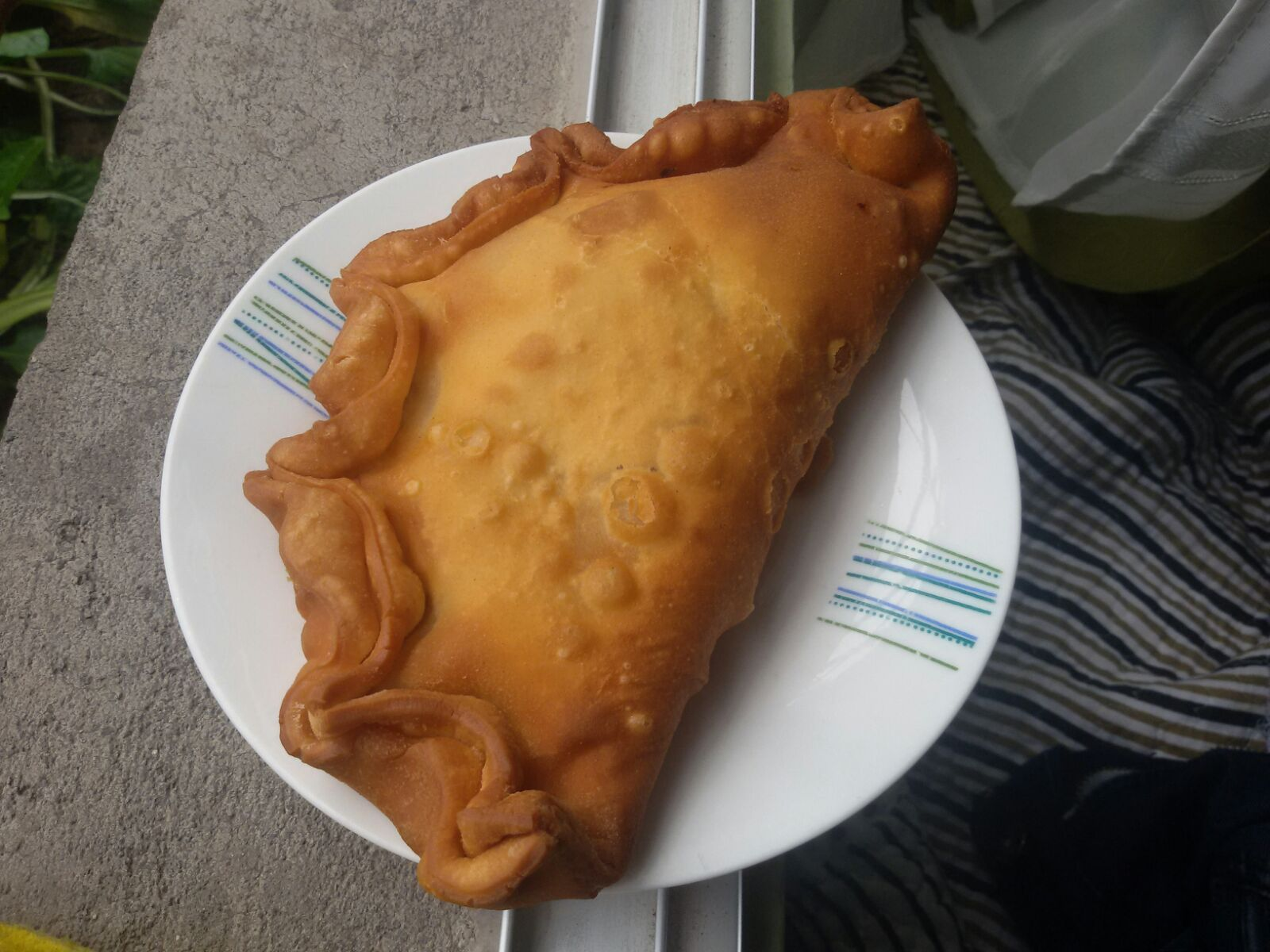 Empanada de pino frita